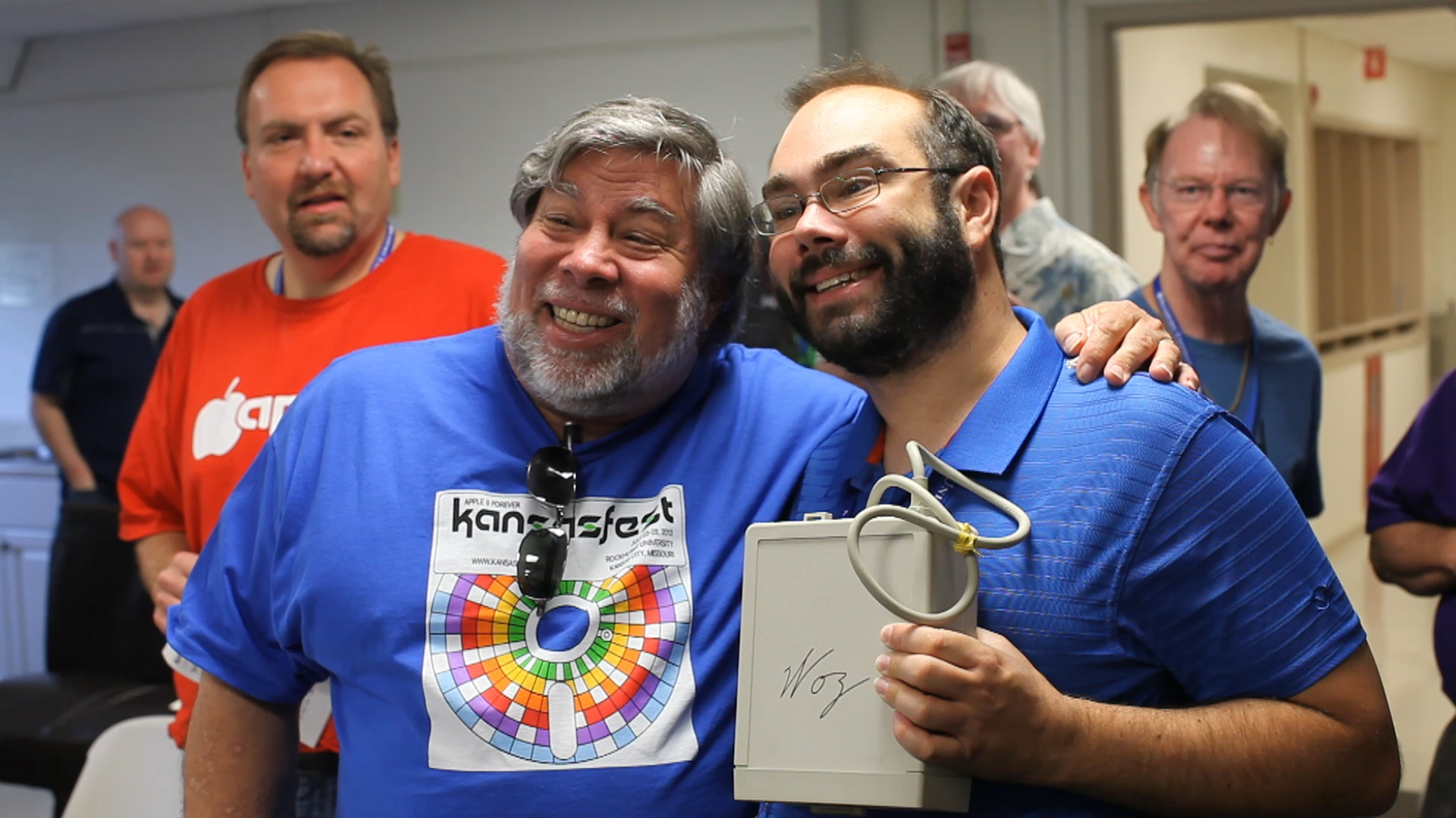 Kansasfest 2013